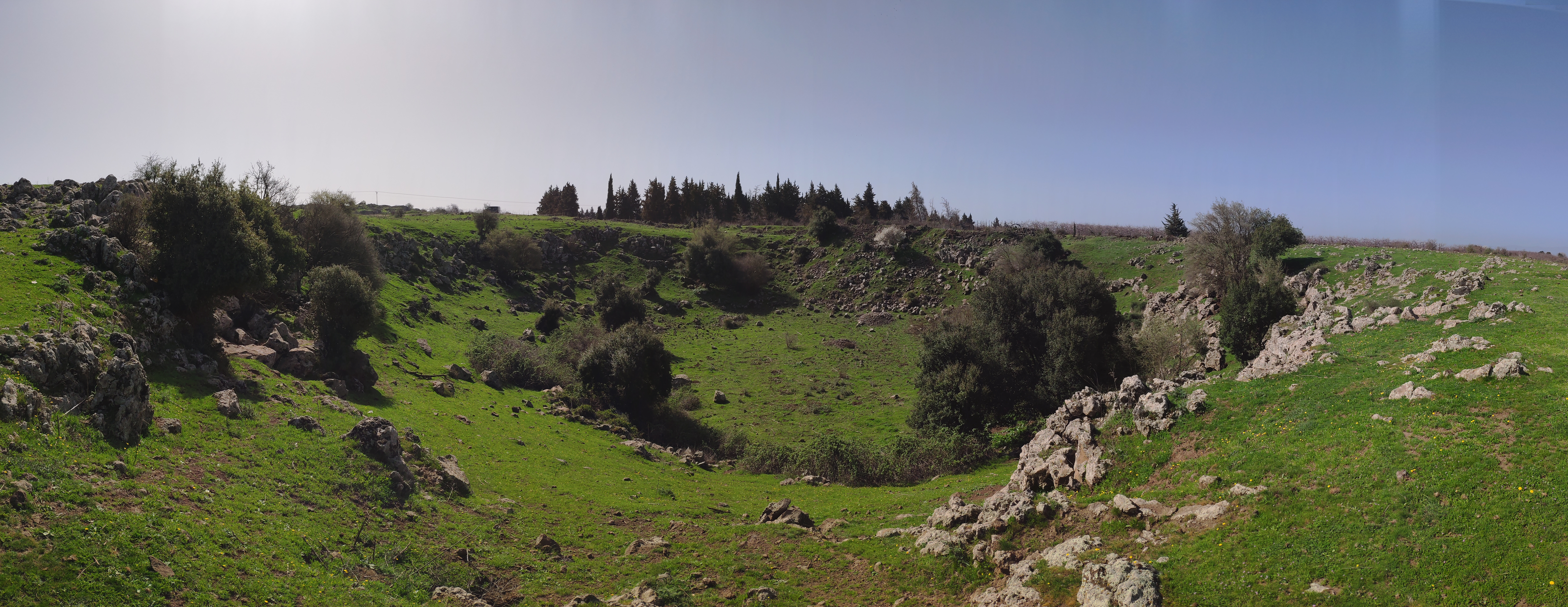 ג'ובה קטנה סמוך לצומת גוב-געש ברמת הגולן, ממערב לכביש 978